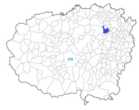 Posizione del comune nella provincia di Cuneo